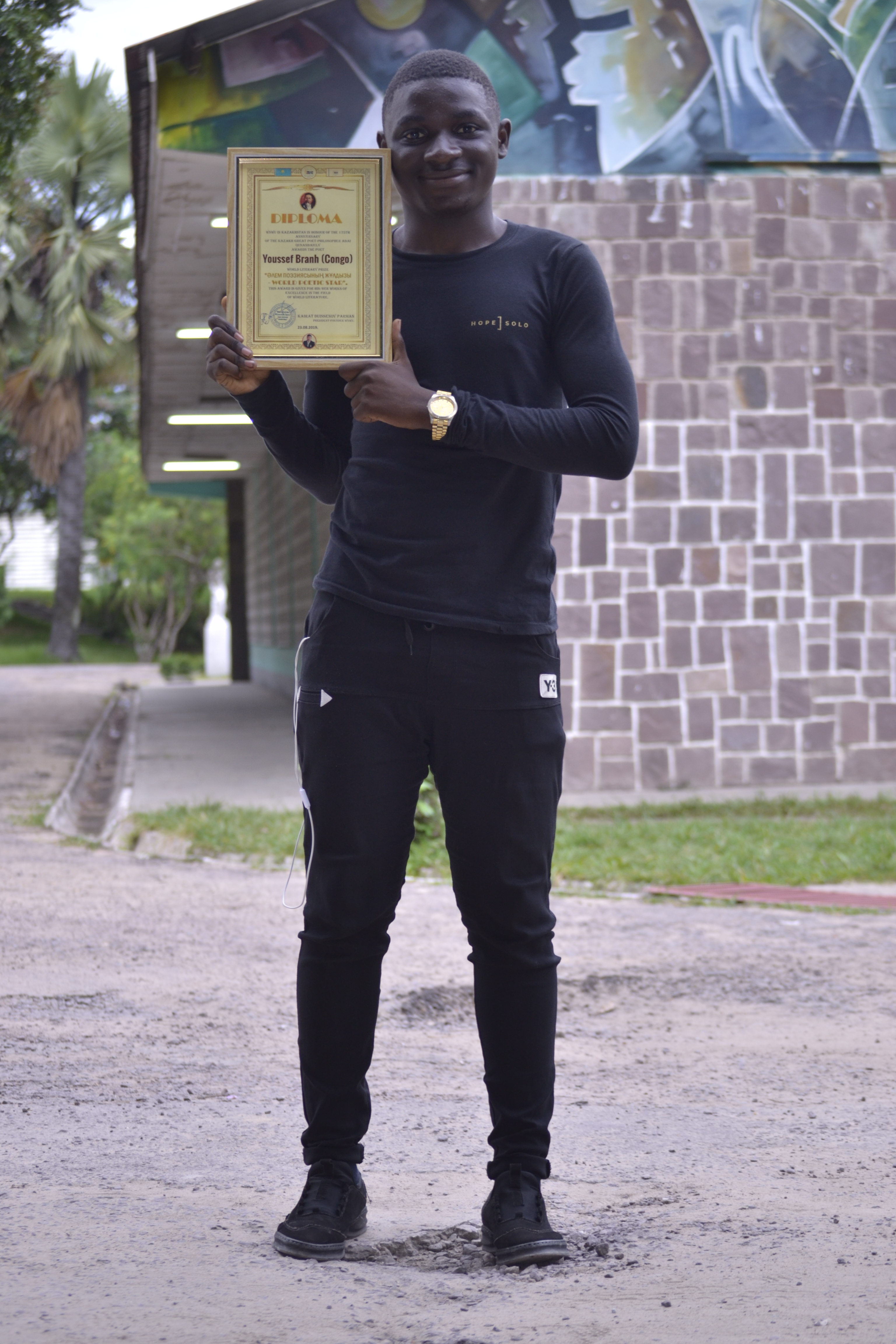 Youssef Branh, Prix